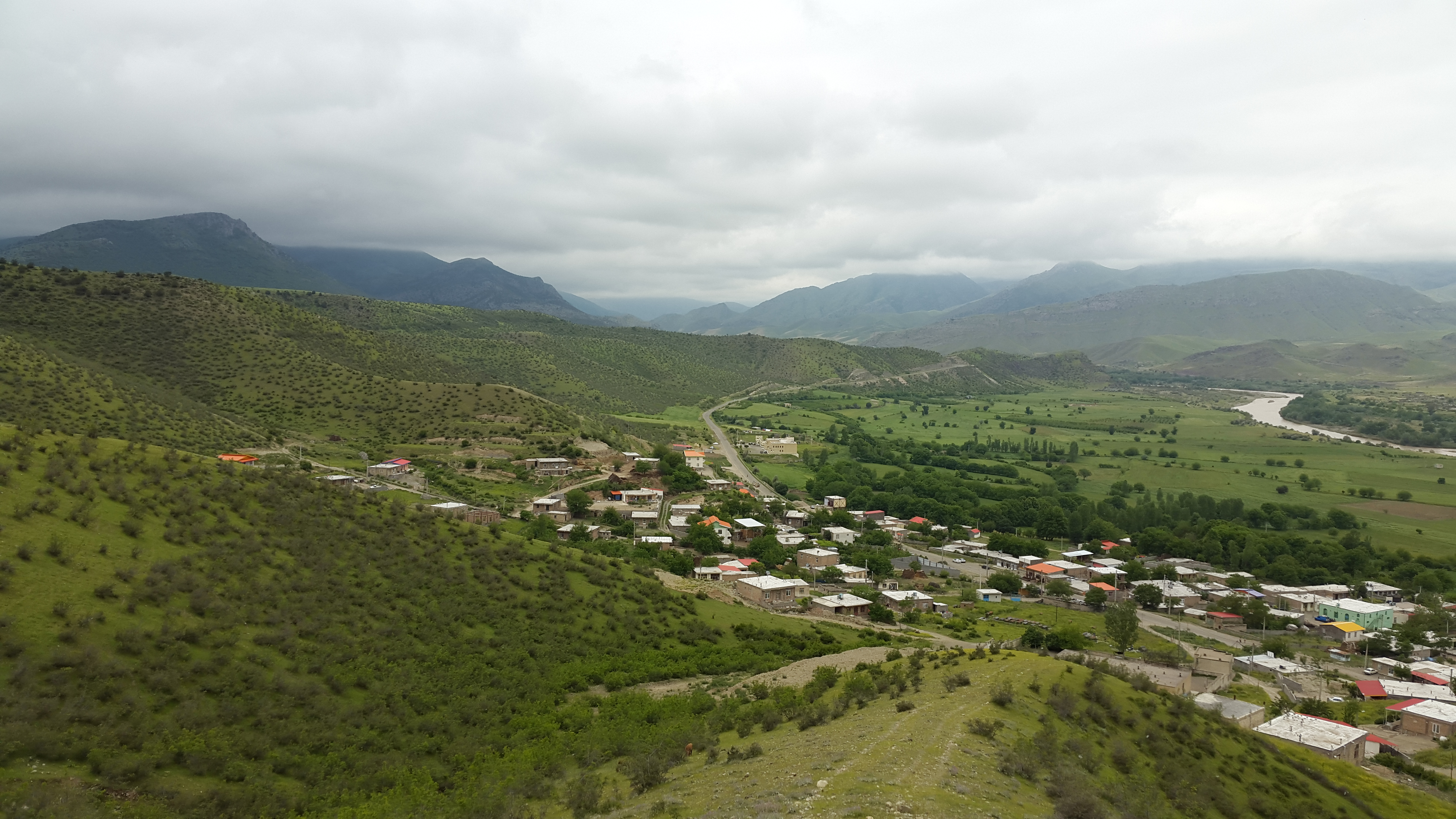 ایبراهیم سمی